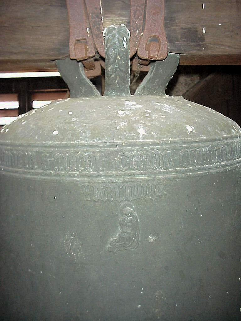 bell in Svádov